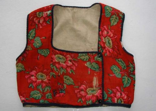 Музей: Брэсцкі абласны краязнаўчы музей Тып: рэчавыя помнікі Від: адзенне Прадметнае імя: безрукаўка жаночая Назва/аўтарская назва: Кабат Матэрыялы: тканіна ваўняная; лён; Тэхналогіі стварэння: пашыў індывідуальны; Дата стварэння: канец ХІХ ст. Месца стварэння: Беларусь, Брэсцкая вобласць, Столінскі раён, в. Аздамічы Памеры: l=40 см